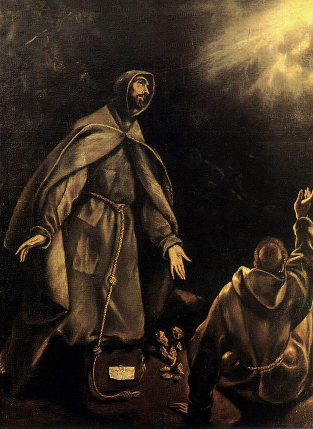 La obra representa a San Francisco de Asís, fundador de la Orden de los franciscanos, en actitud extática y en compañía de otro monje.